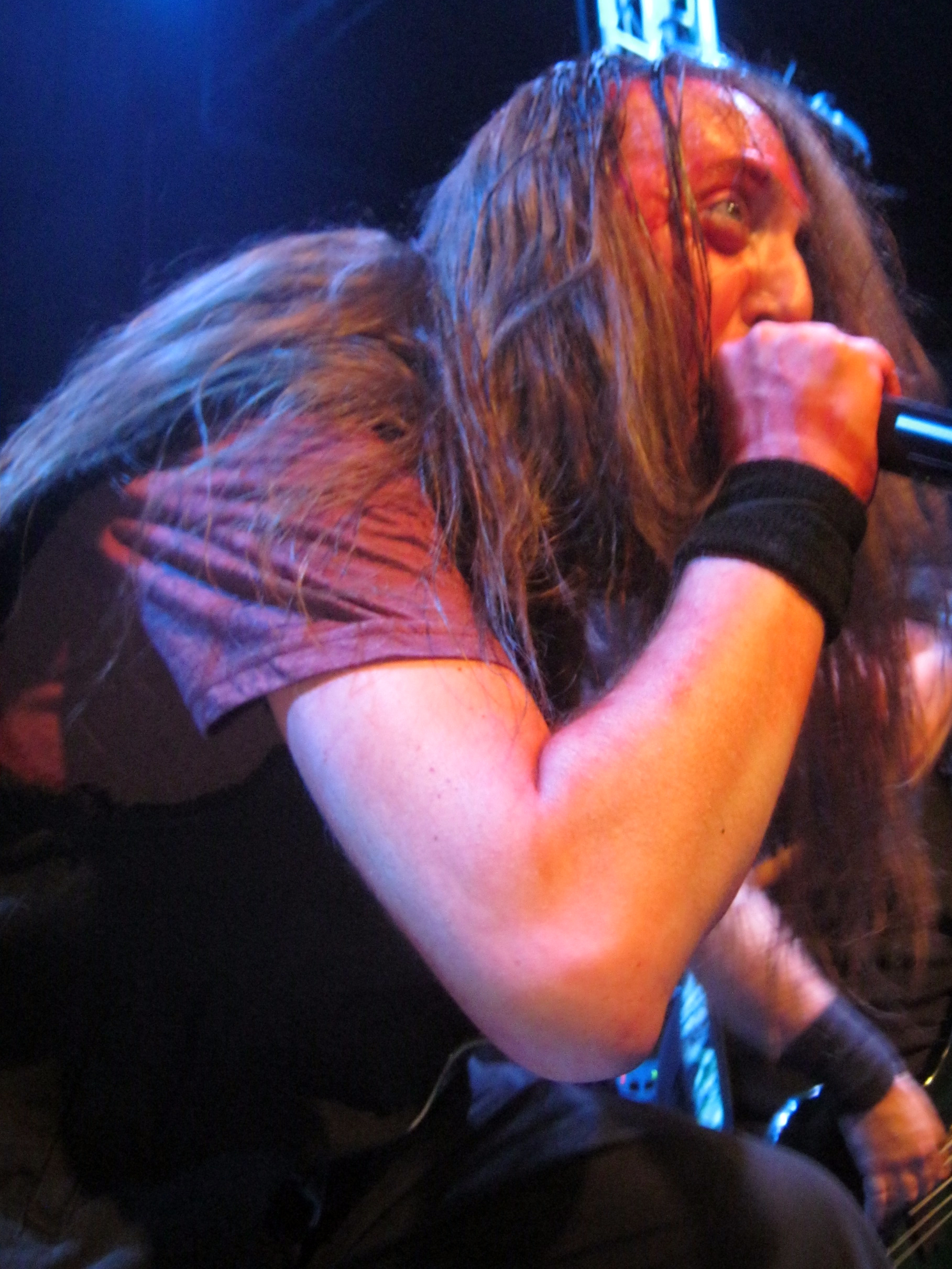 Prey For Nothing Vs Scardust - Metal Fight 02.06.16, Israel